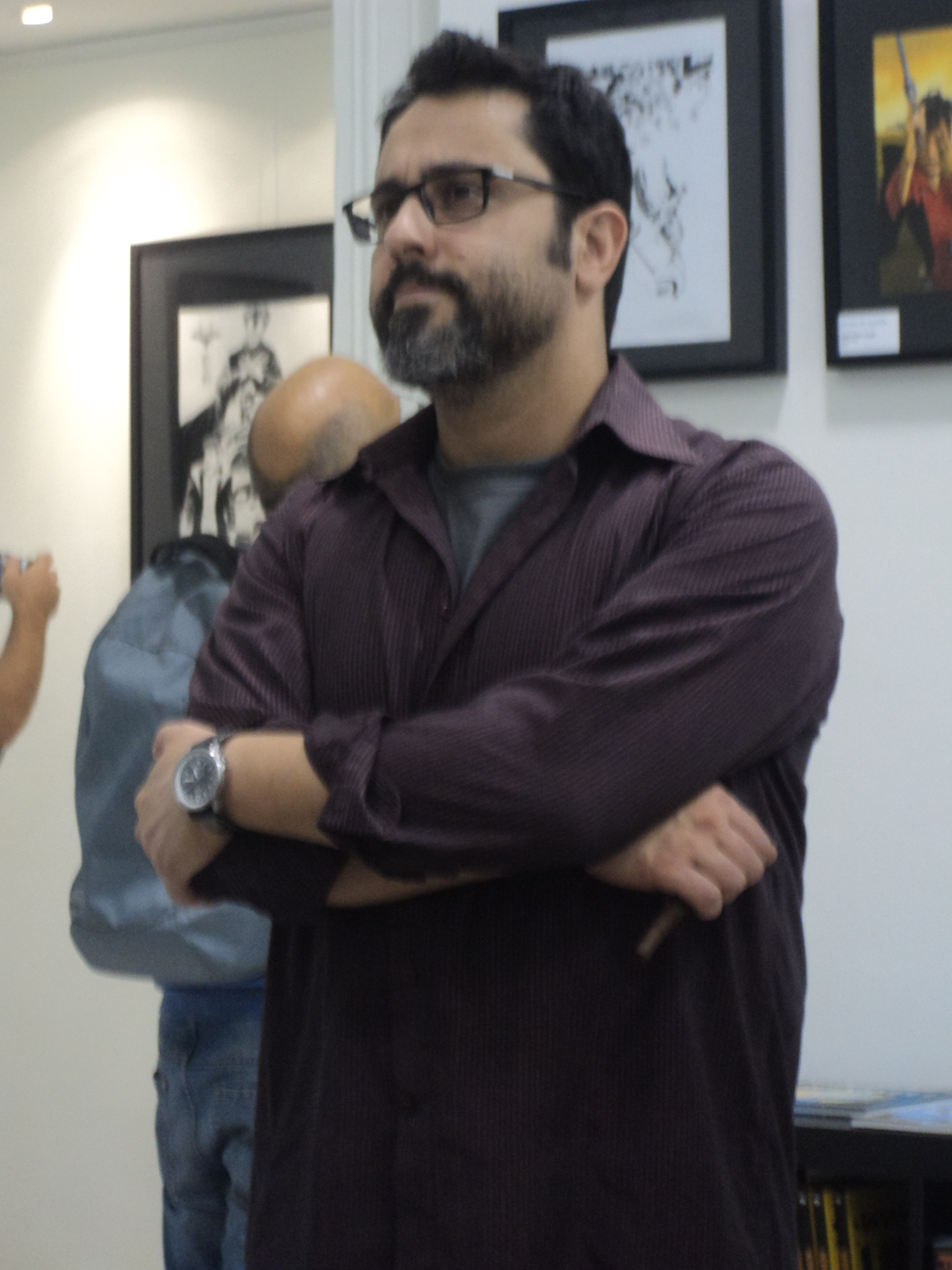 Davide De Cubellis alla Mostra "Dylan Dog e motori: gioie e orrori"